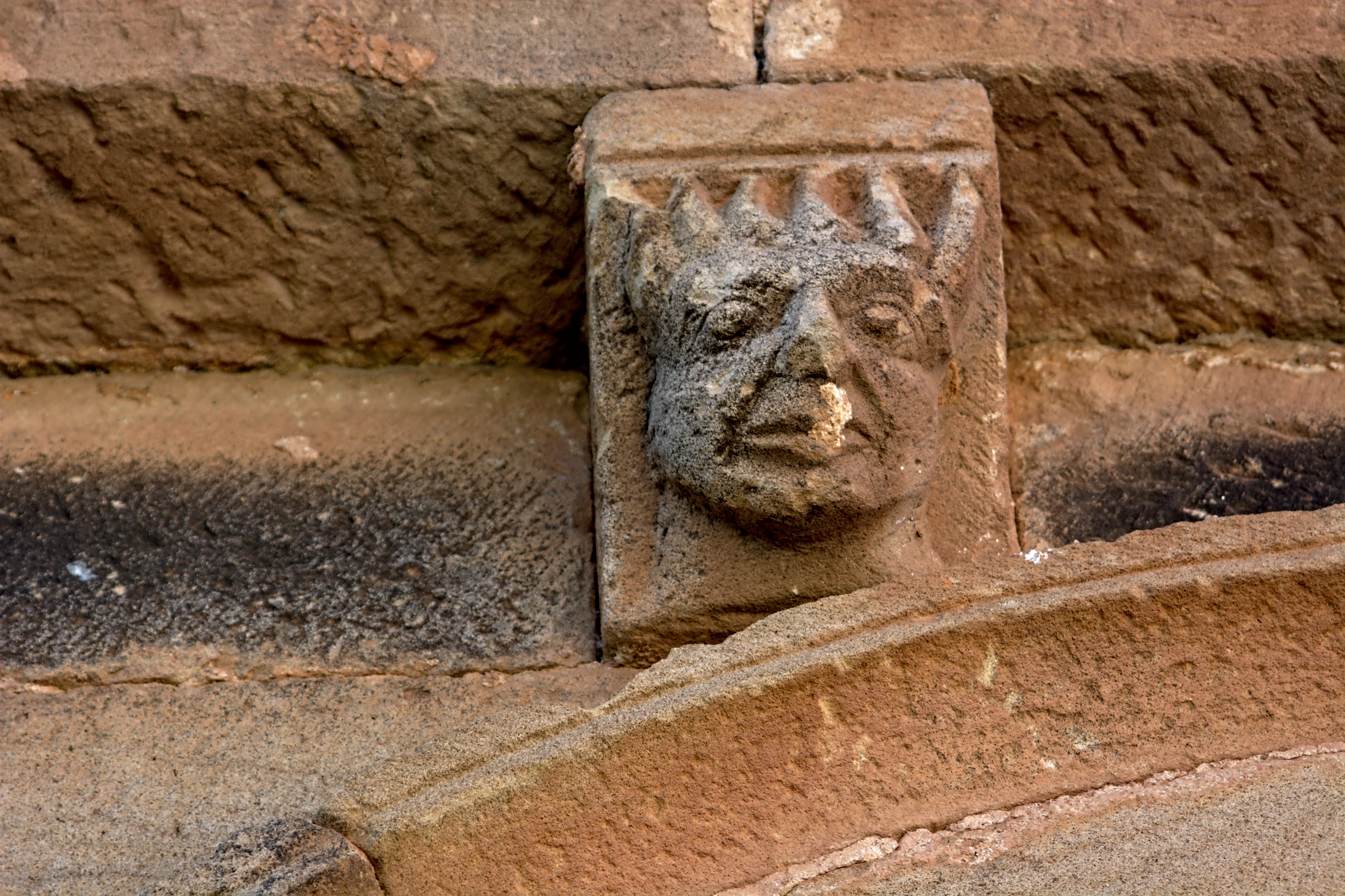 Iglesia de la Asunción de Nuestra Señora - Jaramillo de la Fuente